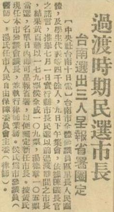 中文（台灣）: 台南市全體參議員區里長人民團體，及學生代表等，03月09日下午集會，依陳儀長官諾言，推舉07月01日行縣市長民選以前過渡期間之市長，結果黃百祿、侯全成、湯德章當選。